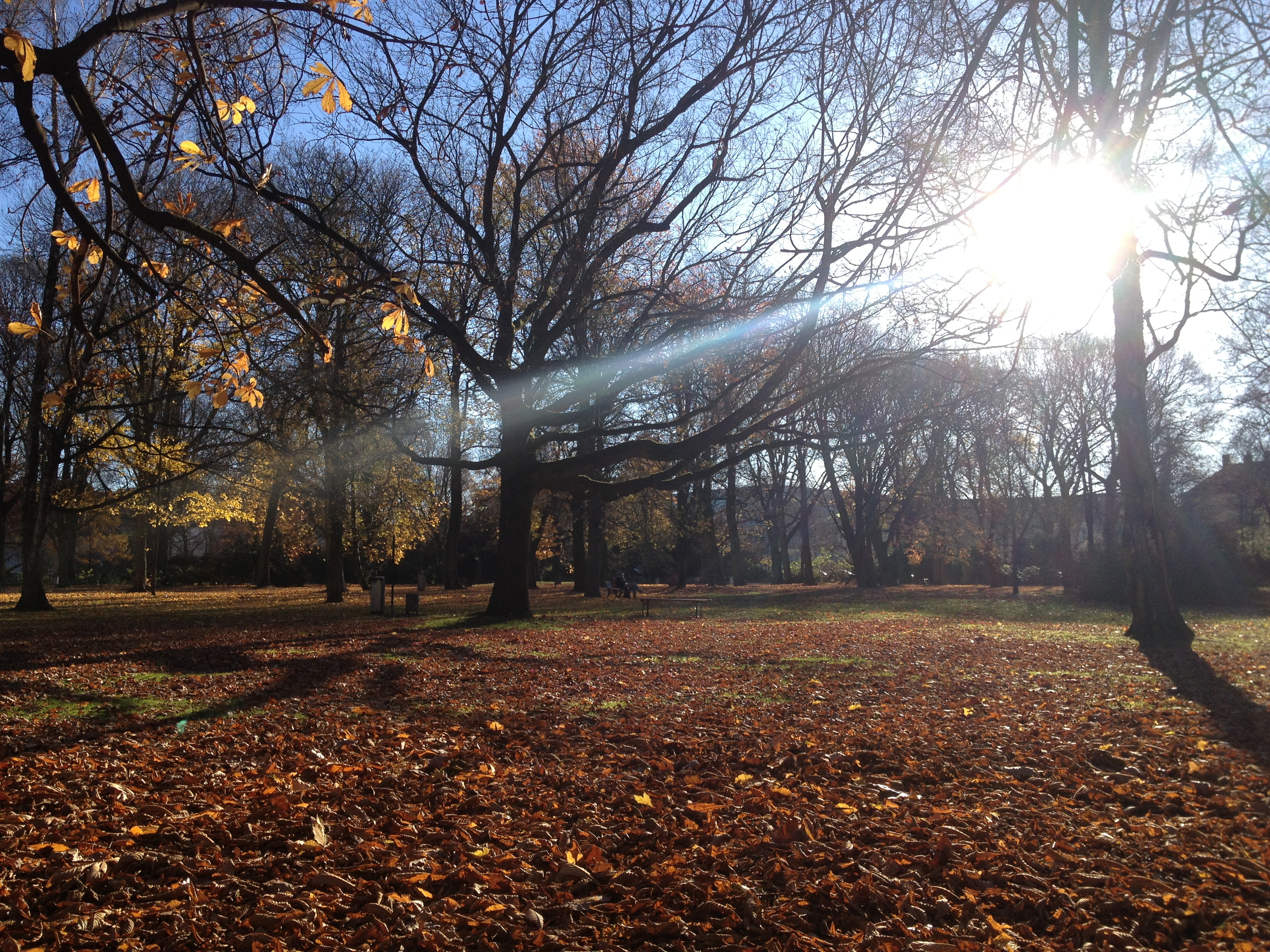 Dortmund Westpark Herbst 2012